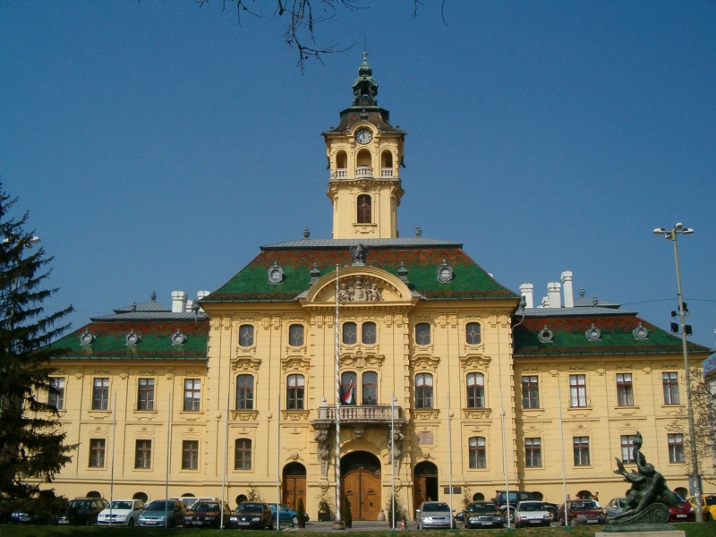 Radnice v Szegedu, Maďarsko